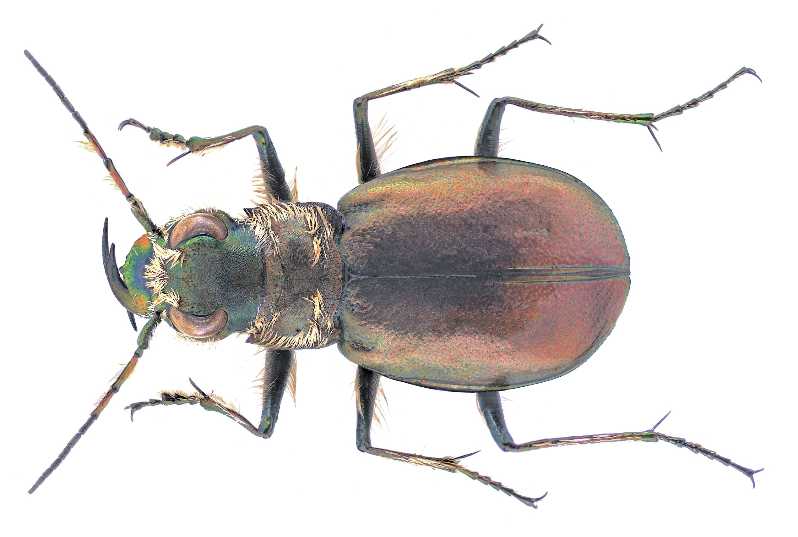 Familie: Carabidae Grösse: 14 mm Fundort: Namibia, Swakopmund leg.U.Schmidt, 1994; det. J.Gebert, 2007 Foto: U.Schmidt, 2007